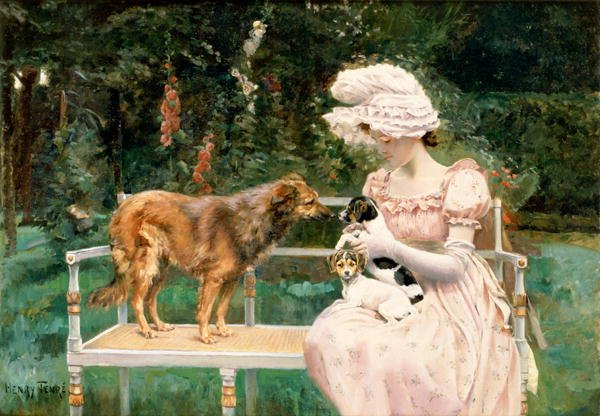 Huile sur toile.